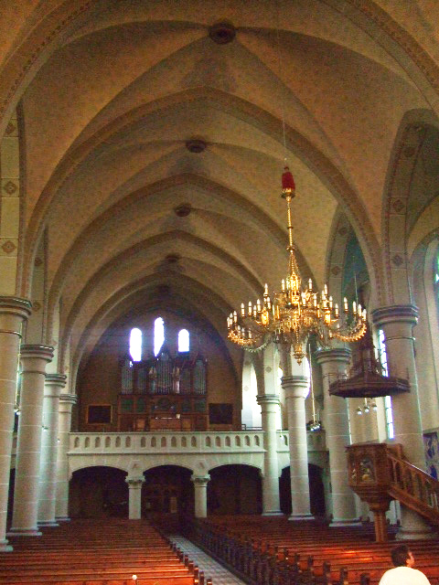 Katholische Pfarrkirche St. Peter und Paul, Röhlingen, Stadt Ellwangen (Jagst)